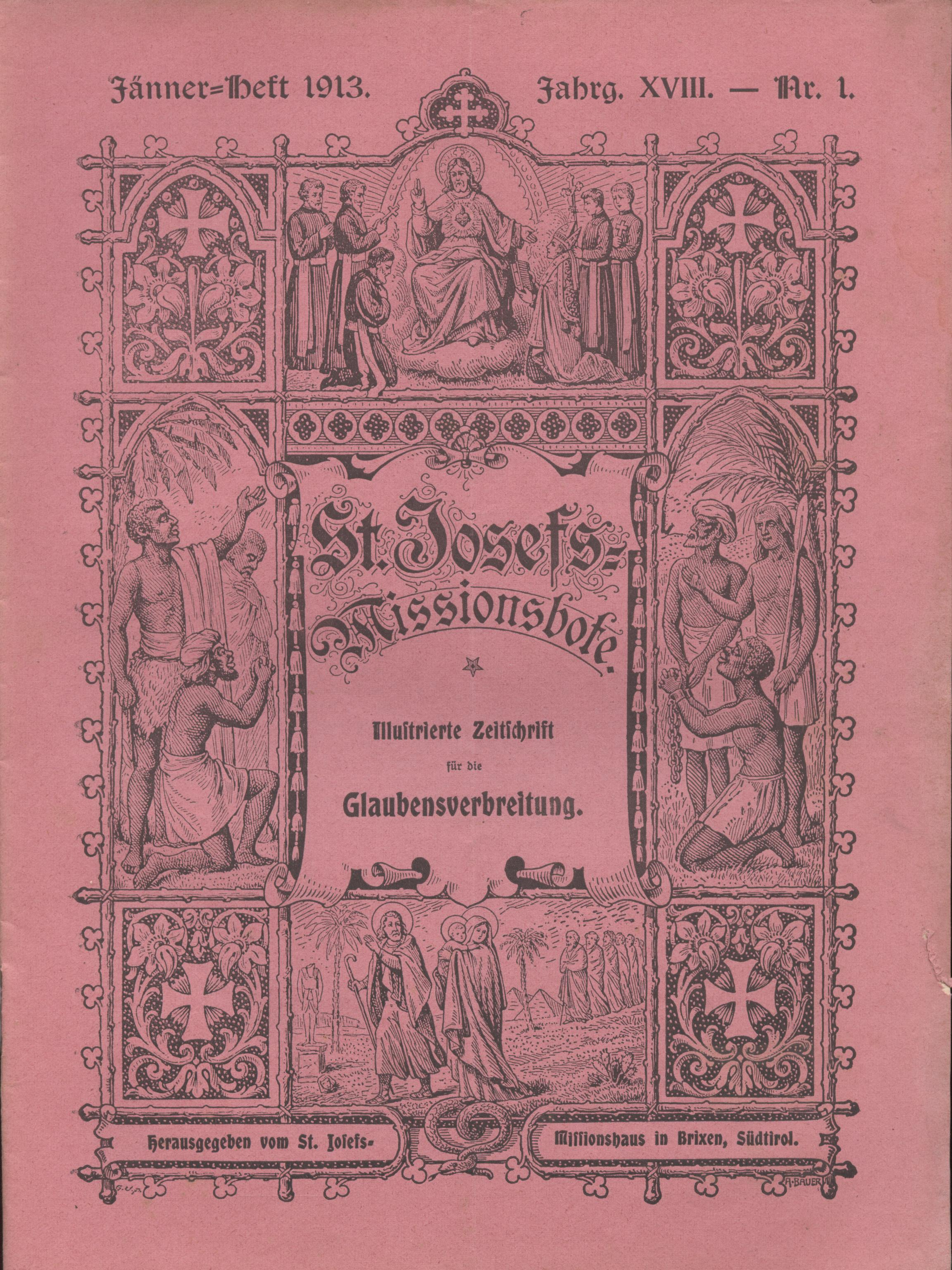 St. Josephs-Missionsbote, Organ der deutschsprachigen Sektion der Missionsgesellschaft St. Joseph (Mill Hill Missionare)